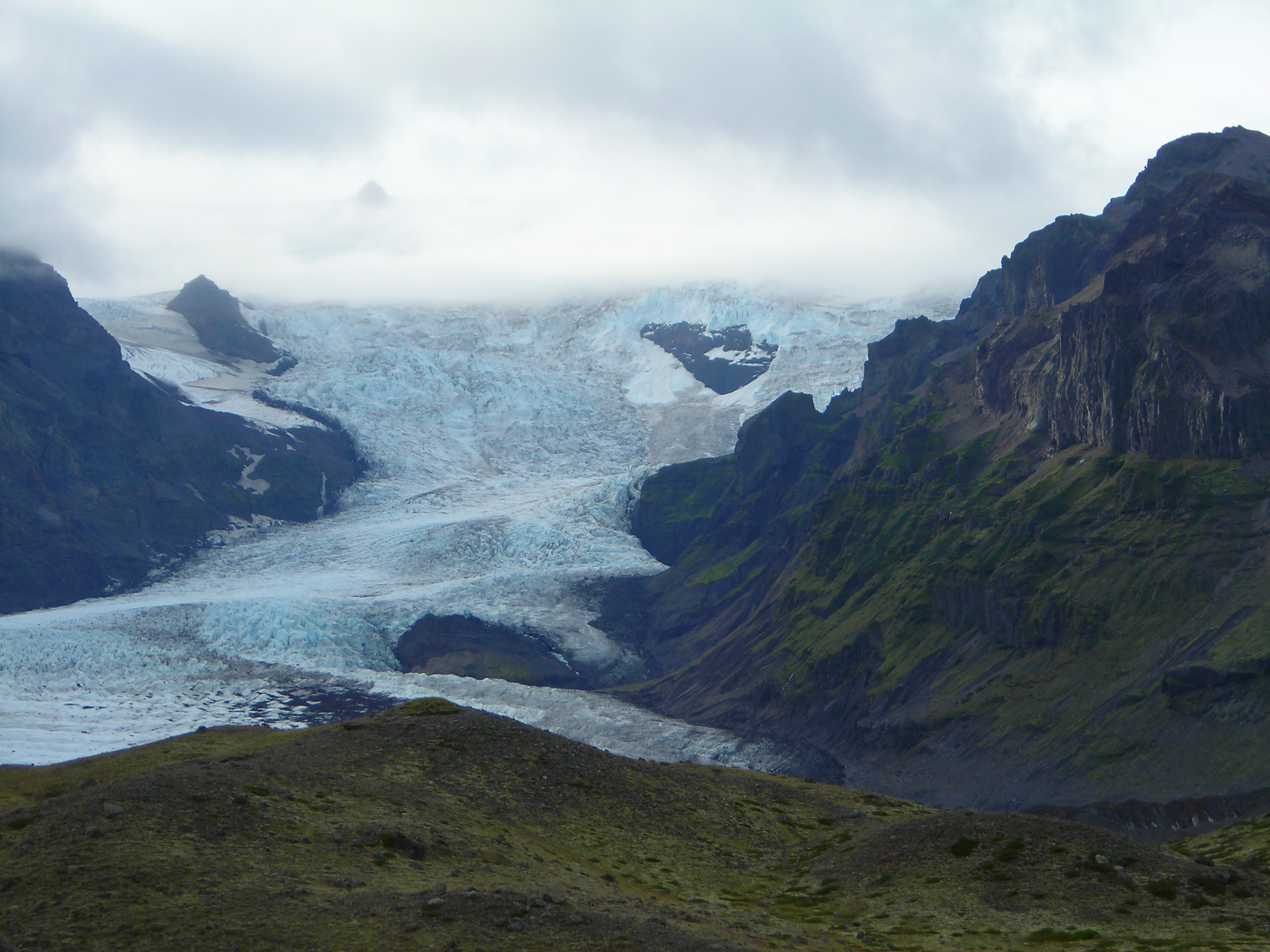 Vatnajökull visto da sud